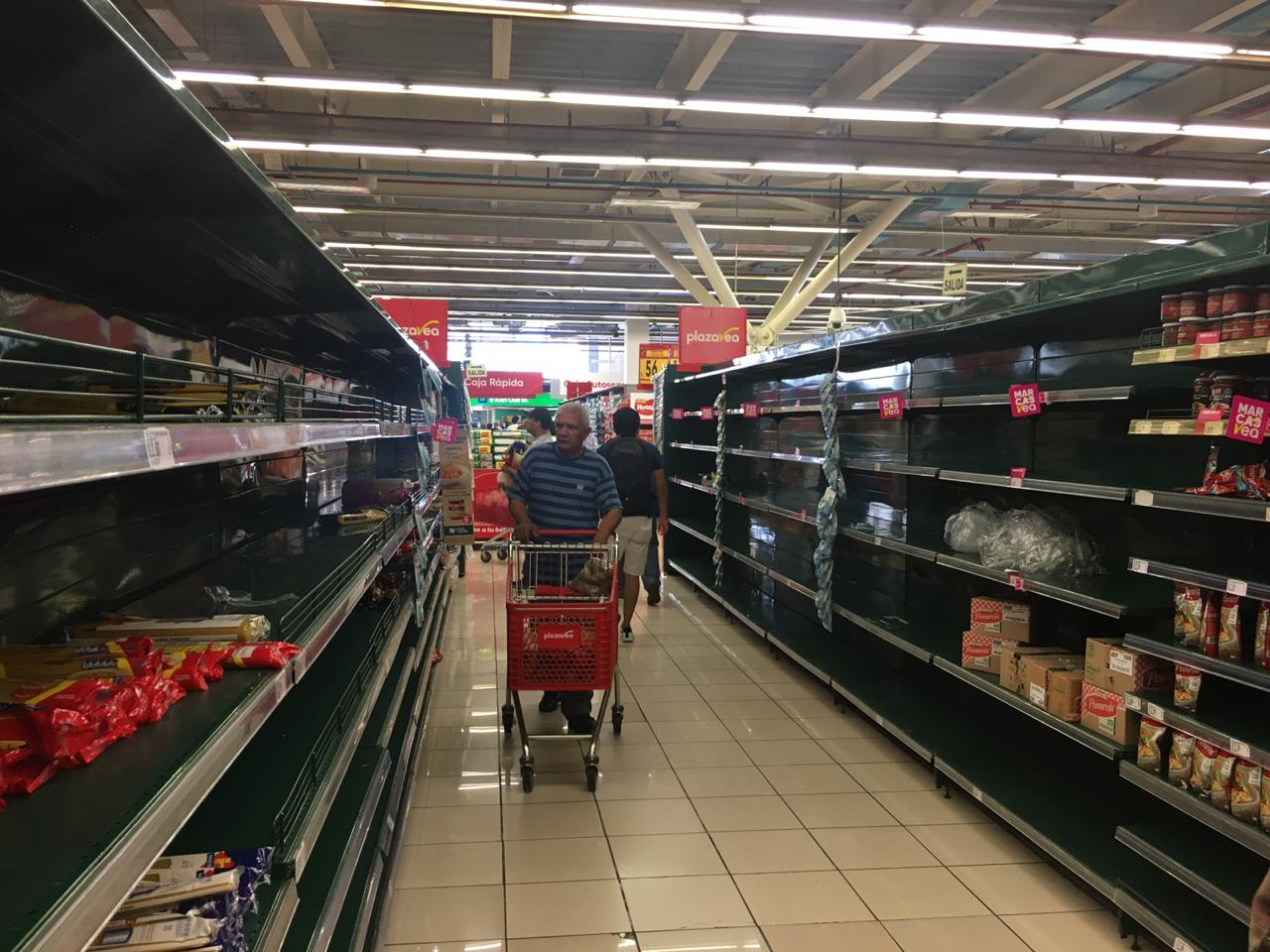 Pandemia en Lima - Peru